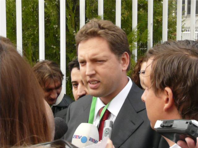 Magyar Demokrata Fórum 2008. szeptember 27 -én, szombaton tartotta XXII. Országos Gyűlését. A Fórum 1987. szeptember 27 -én, az első lakiteleki találkozón alakult meg, akkor még mozgalomként. Almássy Kornél. A felvétel megjelent Creative Commons alatt a Metapolisz DVD sorozatban.